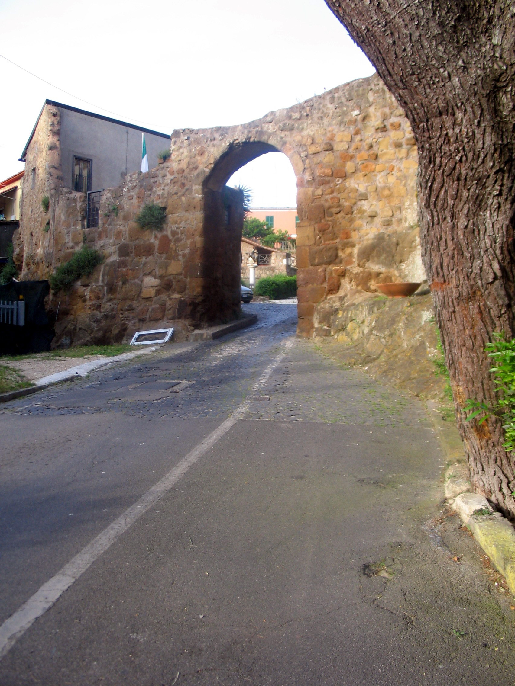 Ardea, Lazio